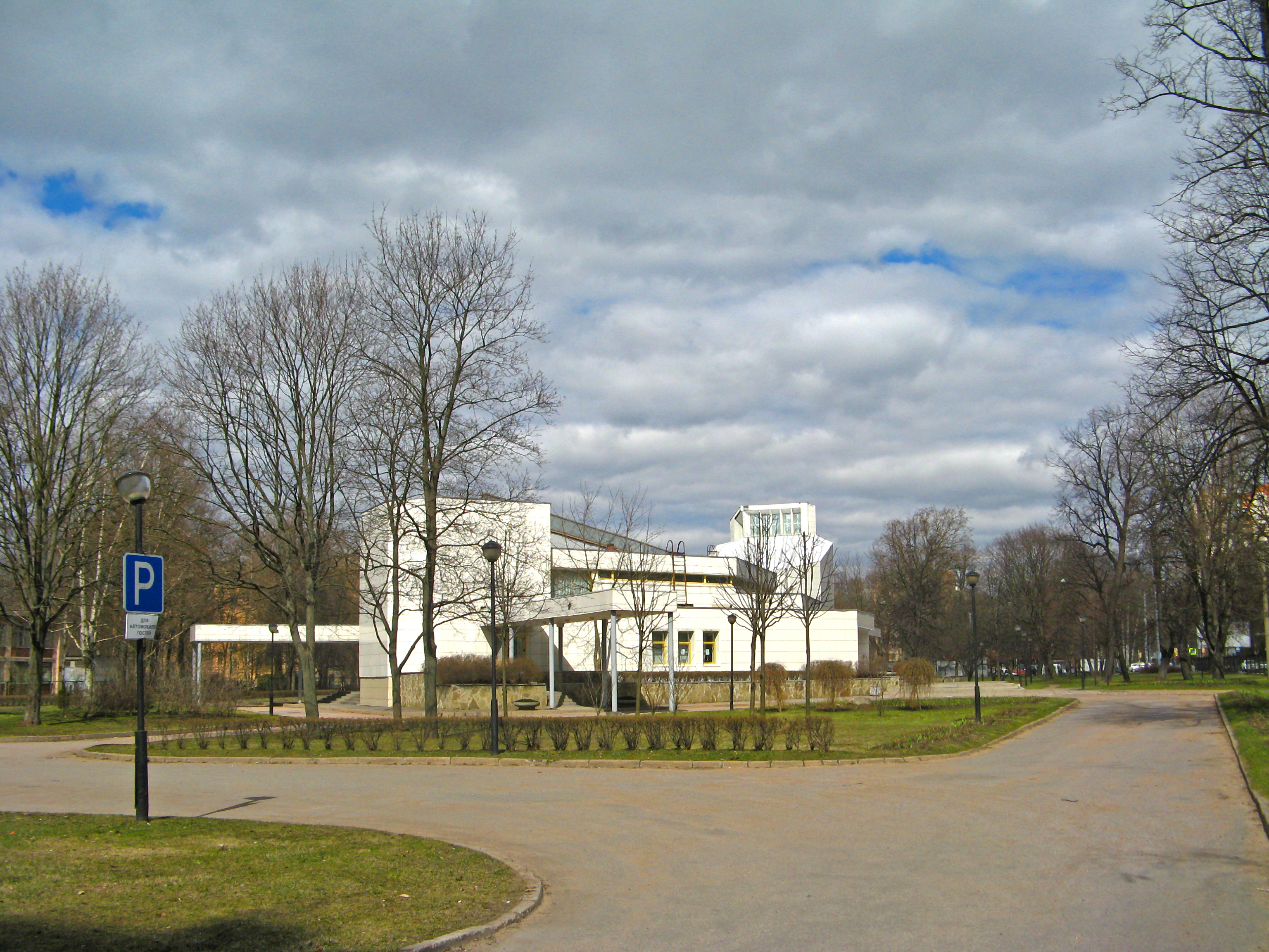 Институтский пр. 8, ЗАГС Выборгского района Санкт-Петербурга